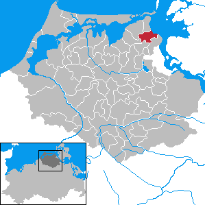 Prohn in Mecklenburg-Vorpommern - District Nordvorpommern